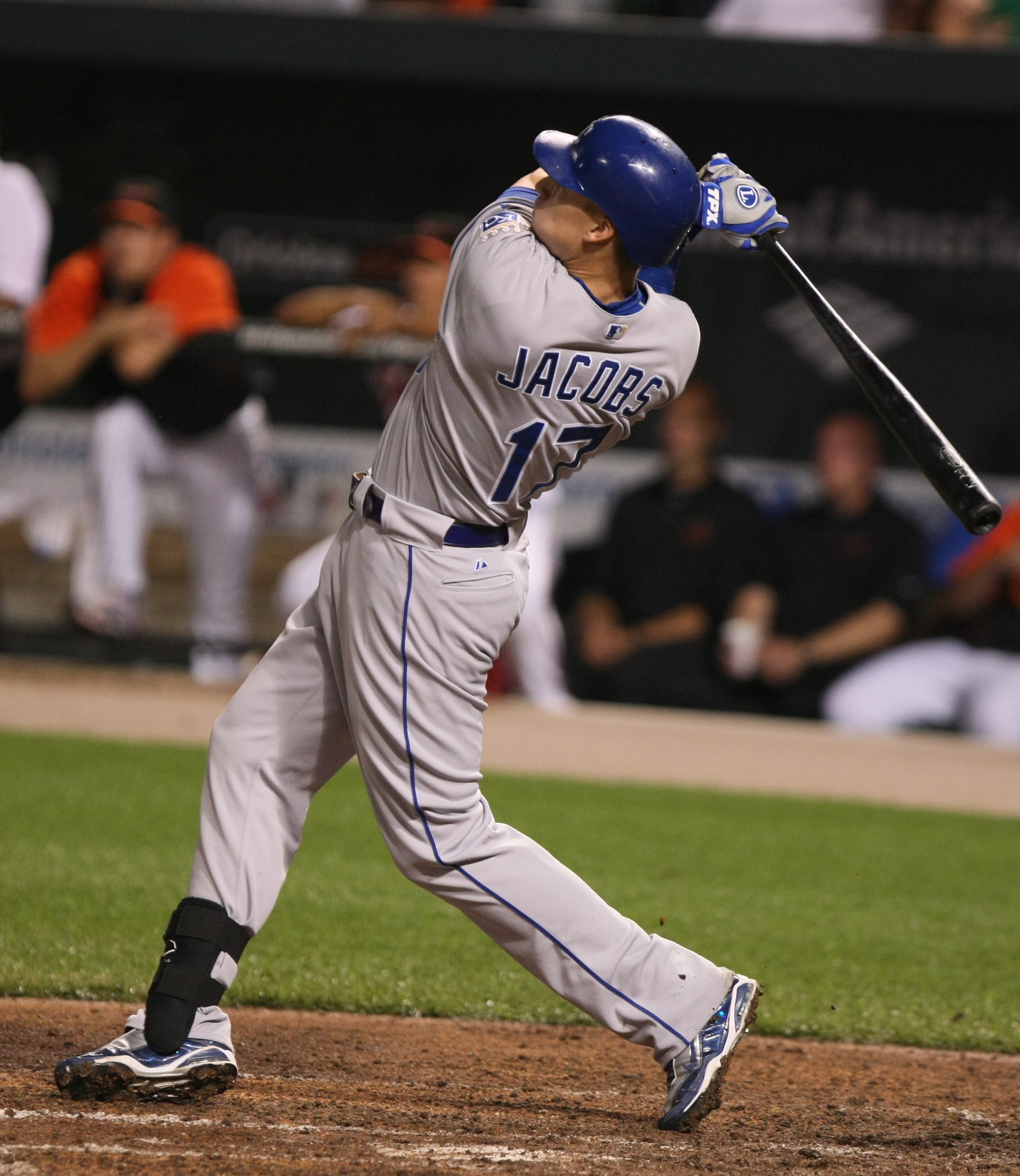 Mike Jacobs